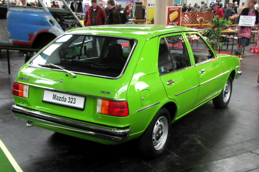 Mazda 323 (1st Series) (1977)